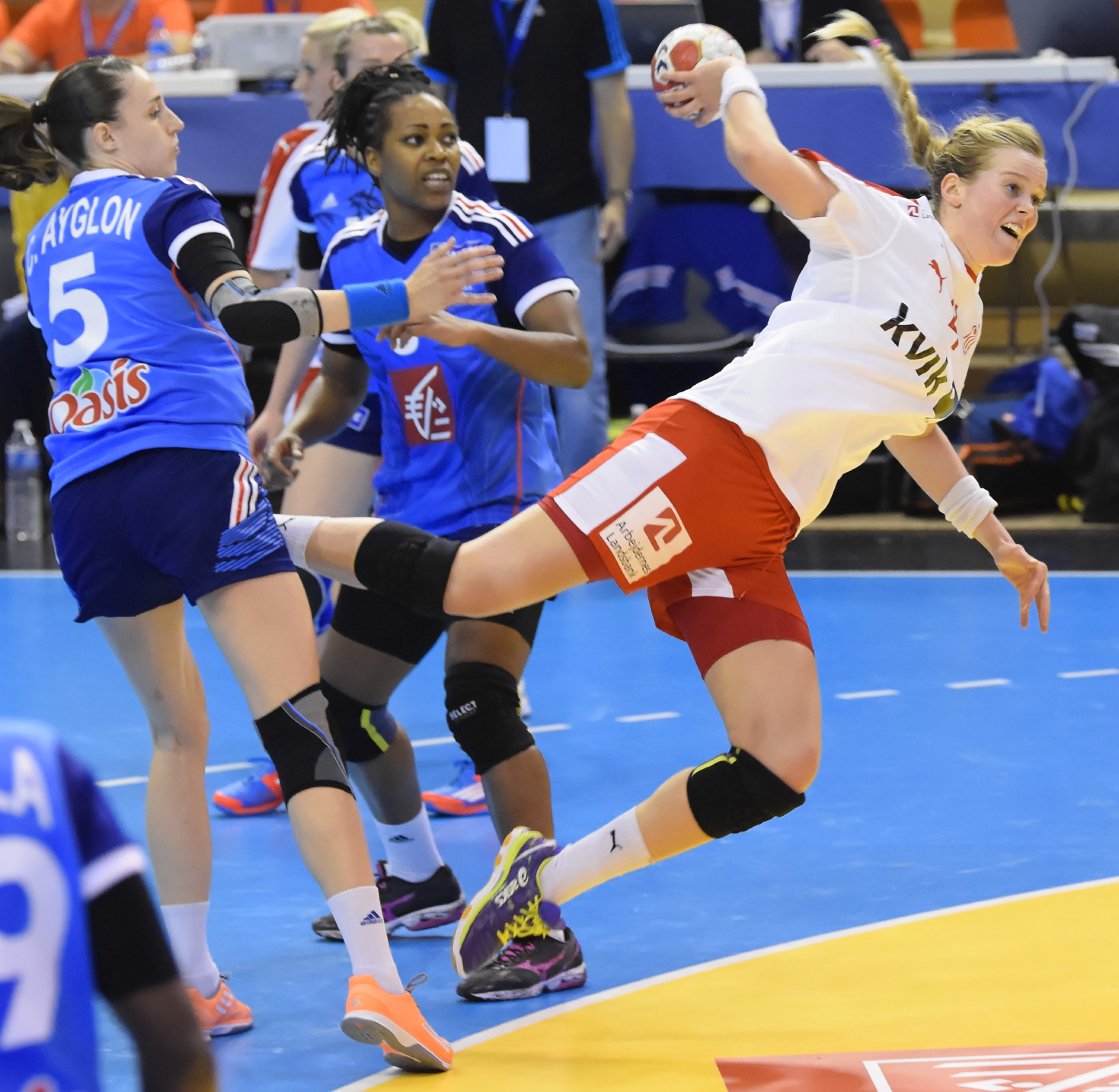 Rencontre France - Danemark lors de la Golden League. A Dijon, le 19 mars 2015.